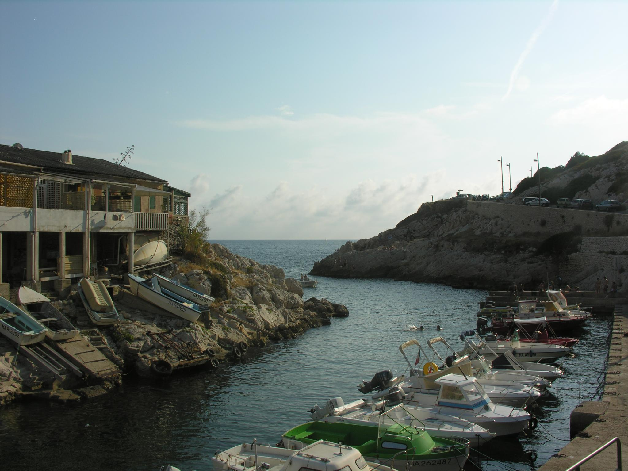 Port de la calanque de Callelongue à Marseille